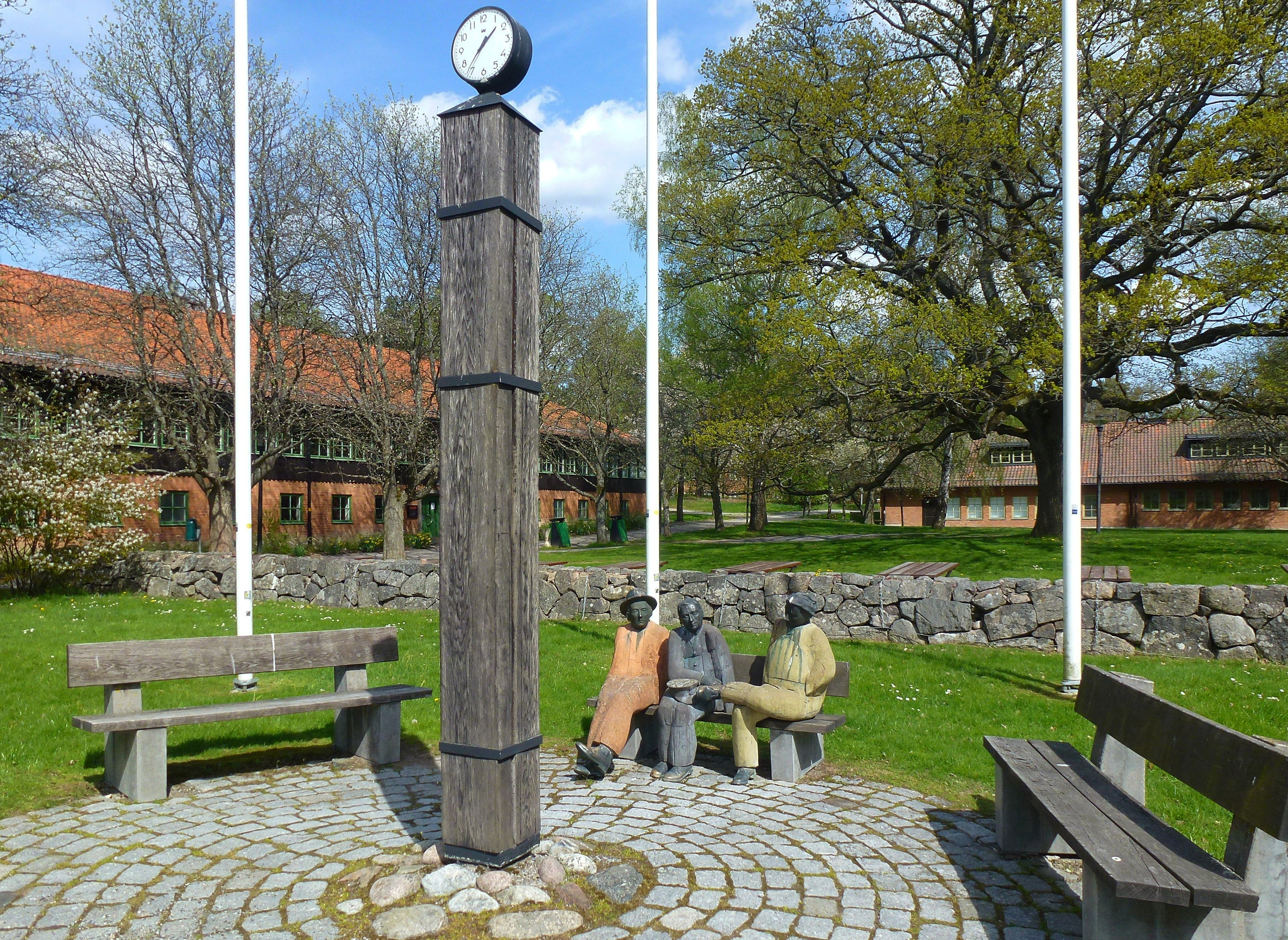 Samtal på en parkbänk. Bildsköne Bengtsson, konstapel Björk och Tumba-Tarzan. Betong, brons och trä, 1994. Staty vid Polishögskolan, Sörentorp. Mats Eriksson (1945-)